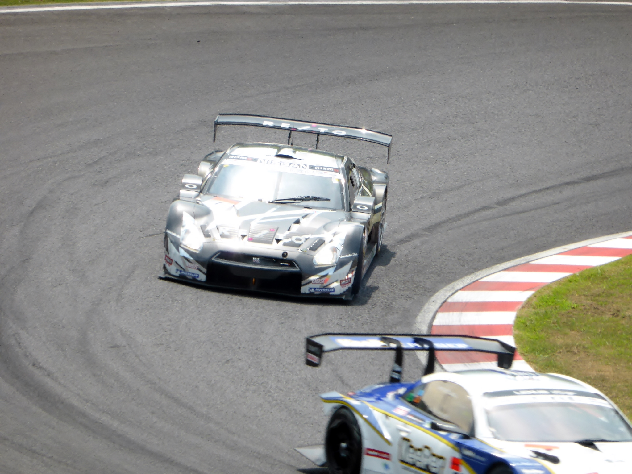 2013年度ポッカサッポロ1000kmに於けるワンシーンを撮影。後日みんカラにもアップロード予定。